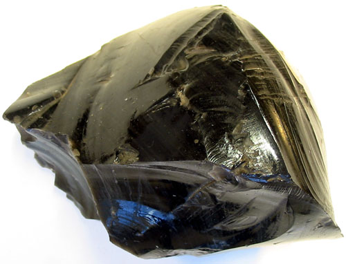 Tüüpiline musta värvi ja karpja murdega obsidiaan